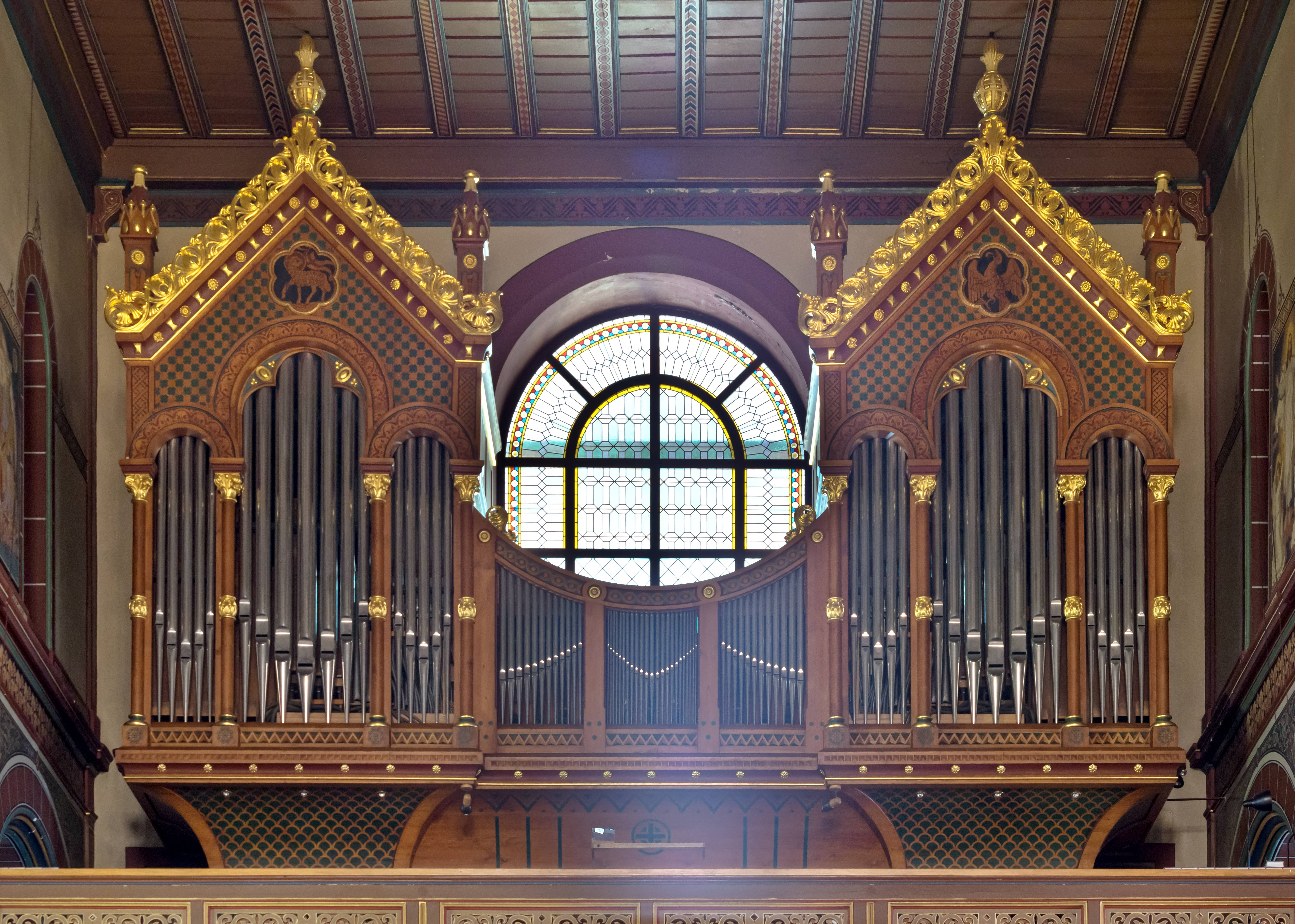 St. Peter und Paul in Bonndorf